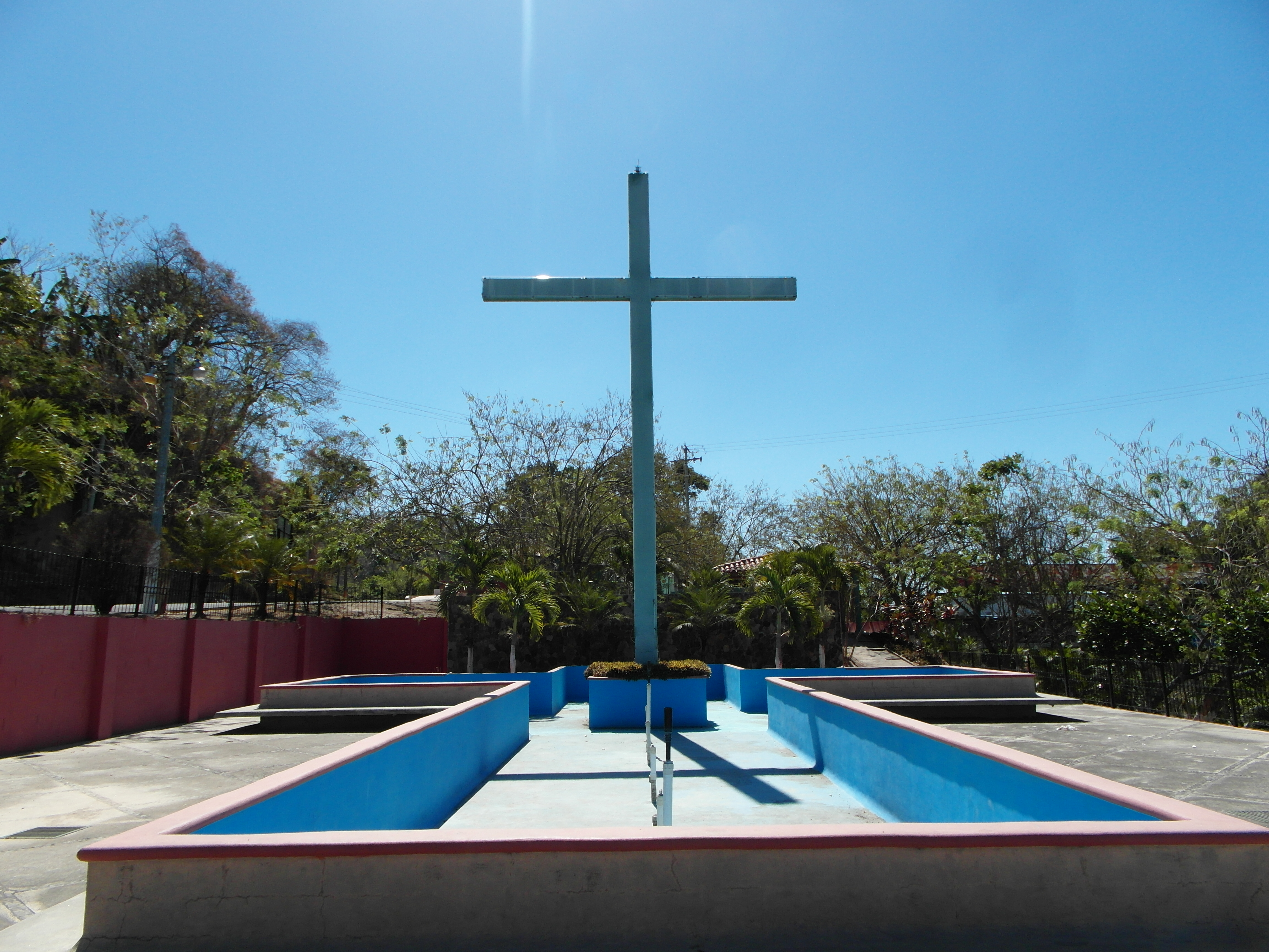 Monumento a la Santa Cruz